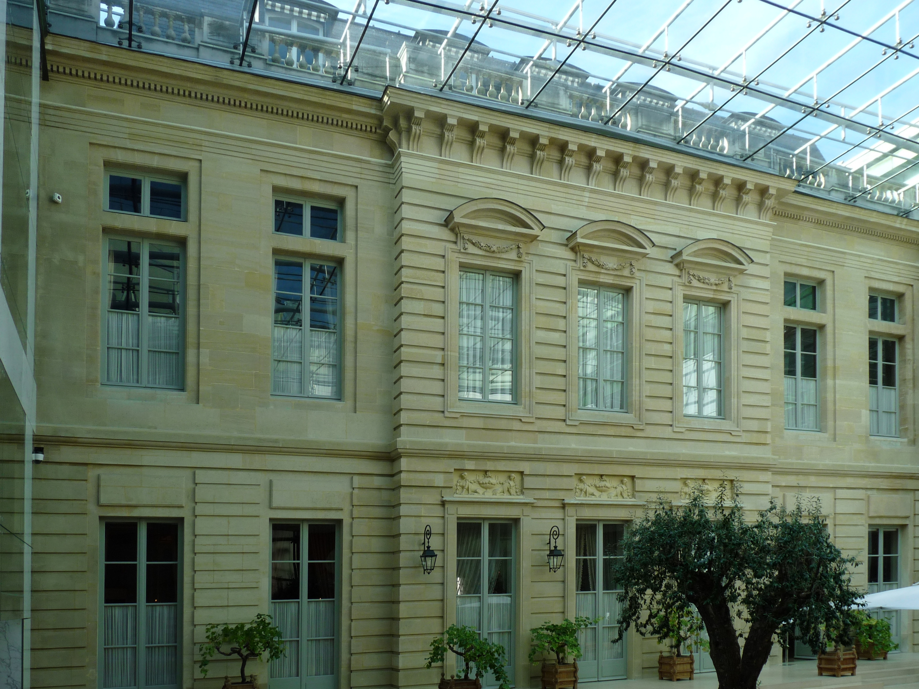 L'hôtel de La Vaupalière à Paris, vue de la cour